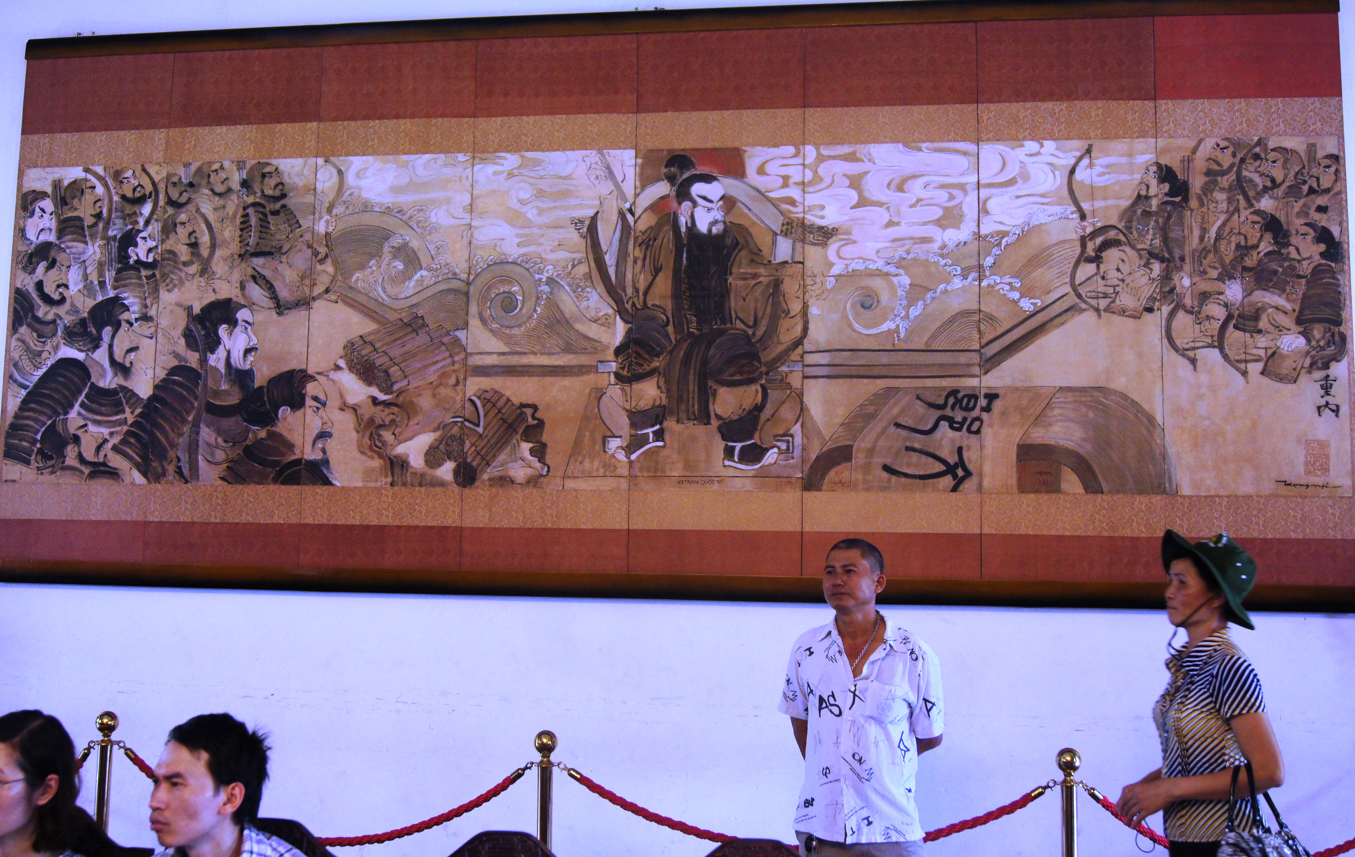 Bức tranh “Quốc tổ Hùng Vương” của hoạ sĩ Trọng Nội vẽ năm 1966 đang được trưng bày tại phòng Khánh tiết Dinh Độc Lập.